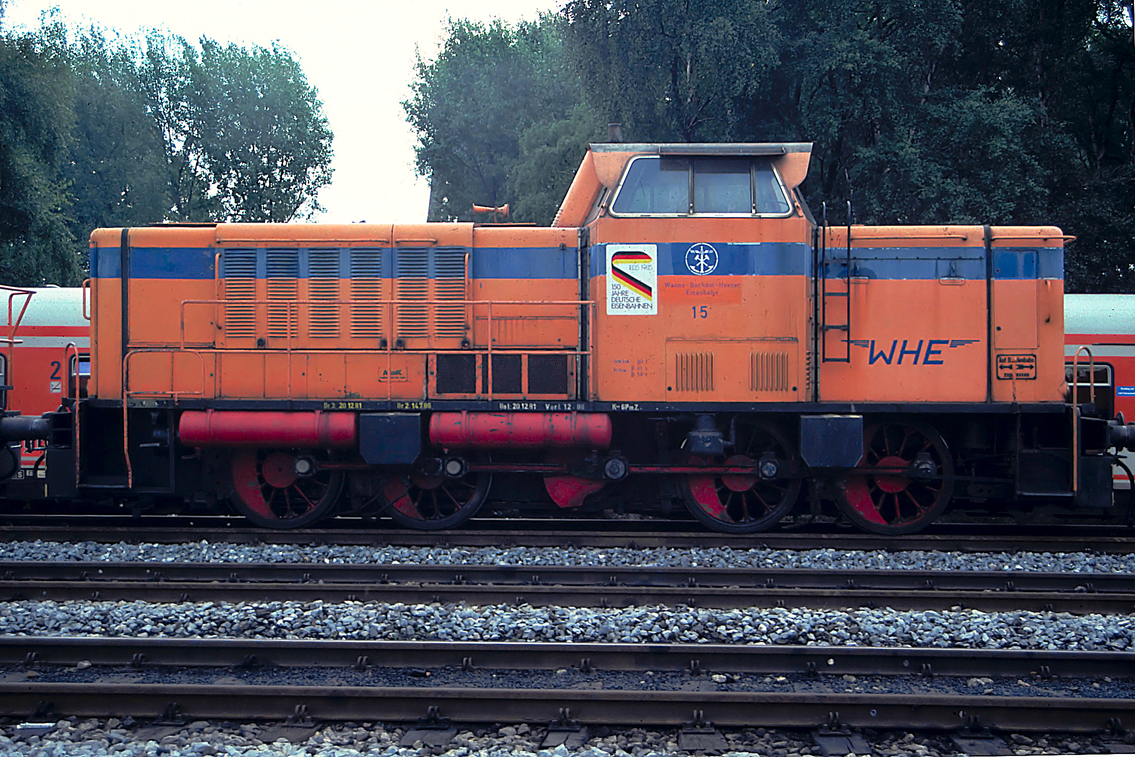 MAK 1200D als Lok 15 der WHE in Herne-Westhafen